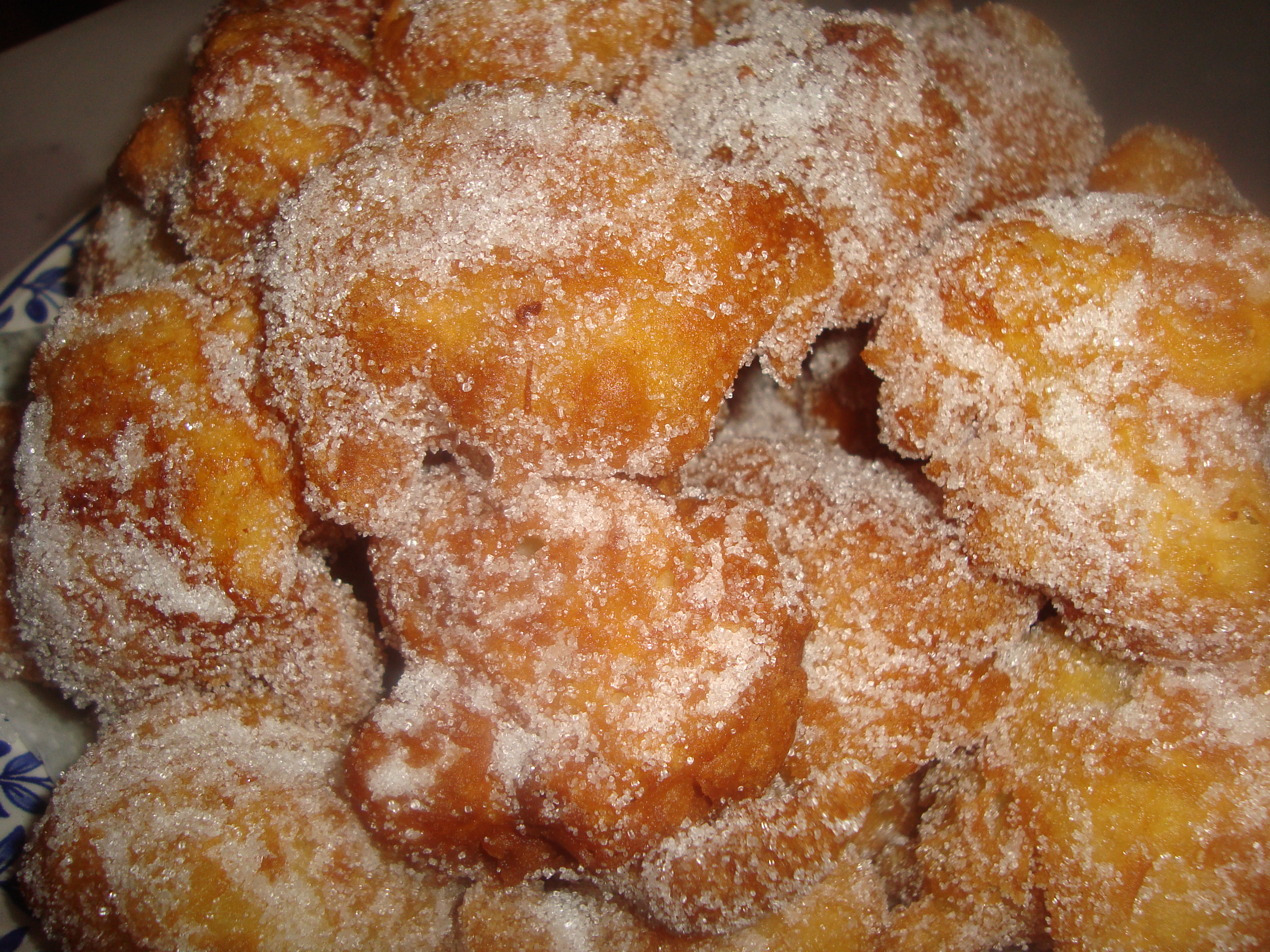 Figes albardaes